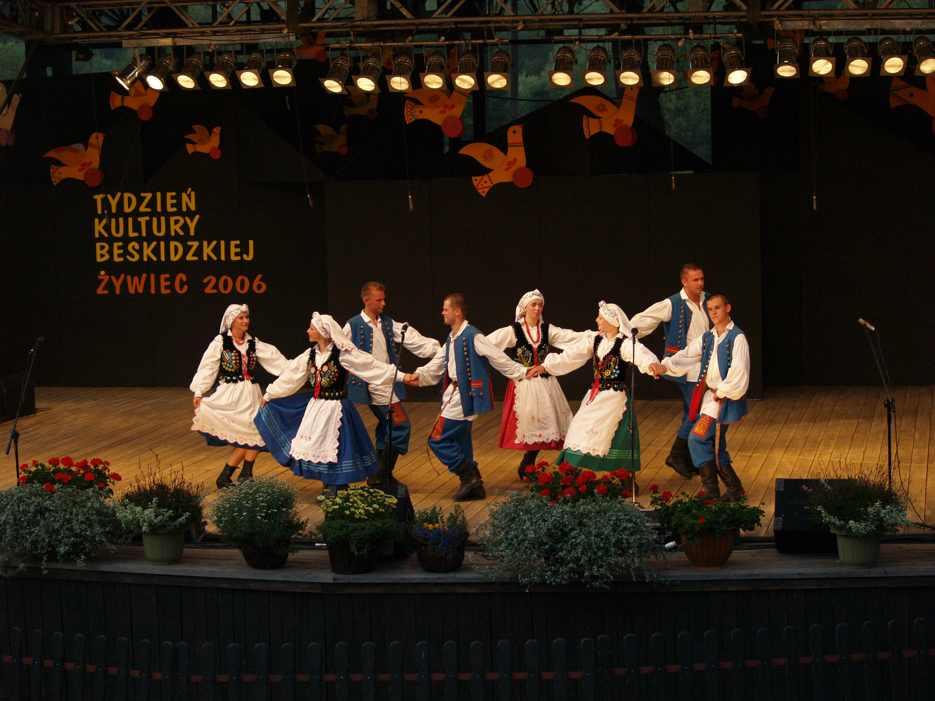 Występ zespołu Chodowiacy z Chodowa podczas 43. Tygodnia Kultury Beskidzkiej w Żywcu.